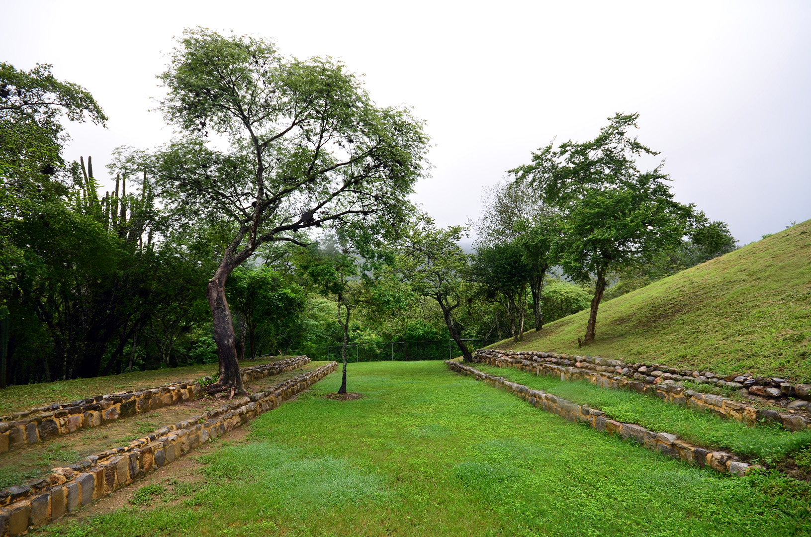 Tancama